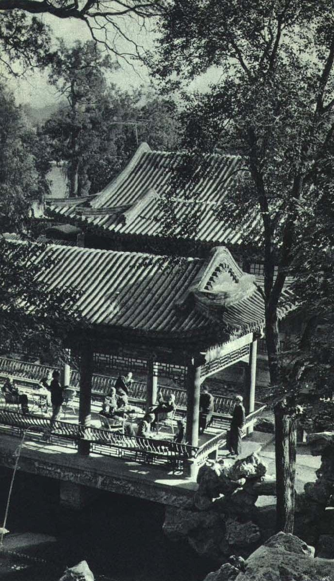 1963-07 1963年 中央文史研究馆